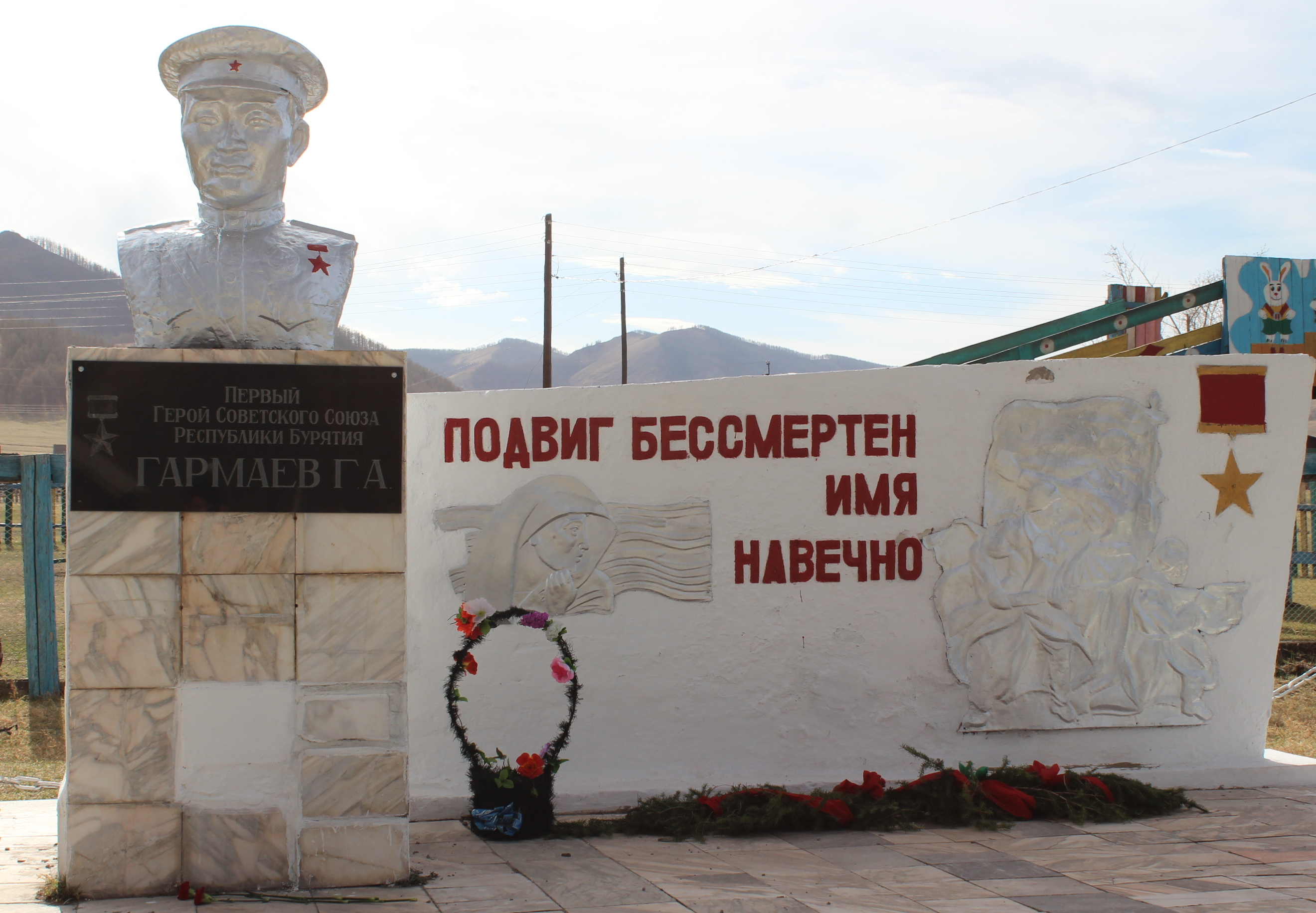 Памятник Герою Советского Союза Г. Гармаеву в Верхнем Торее. Бурятия, Джидинский район